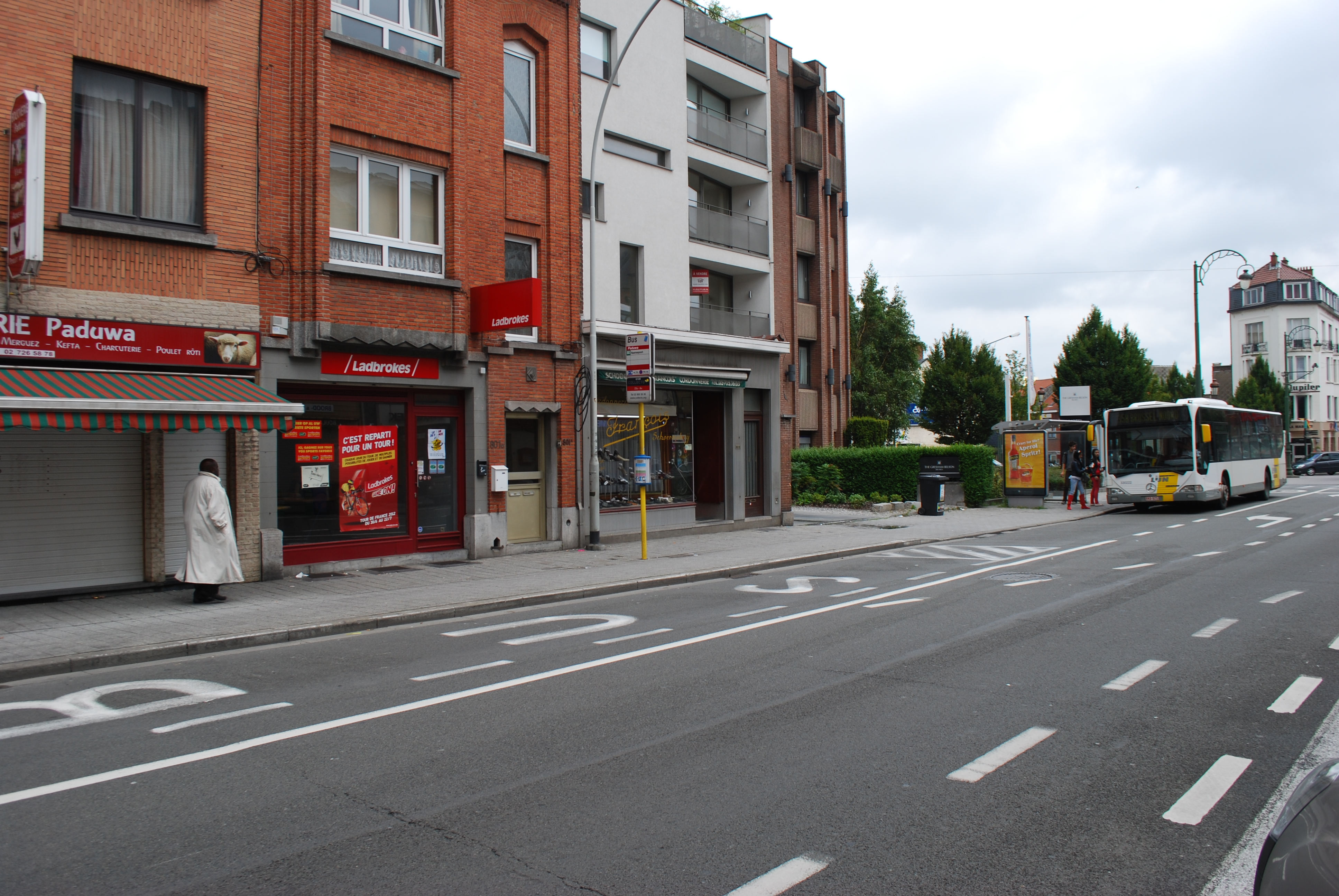 Vue sur la chaussée de Louvain (vers la place Jean De Paduwa) à Evere (Bruxelles).